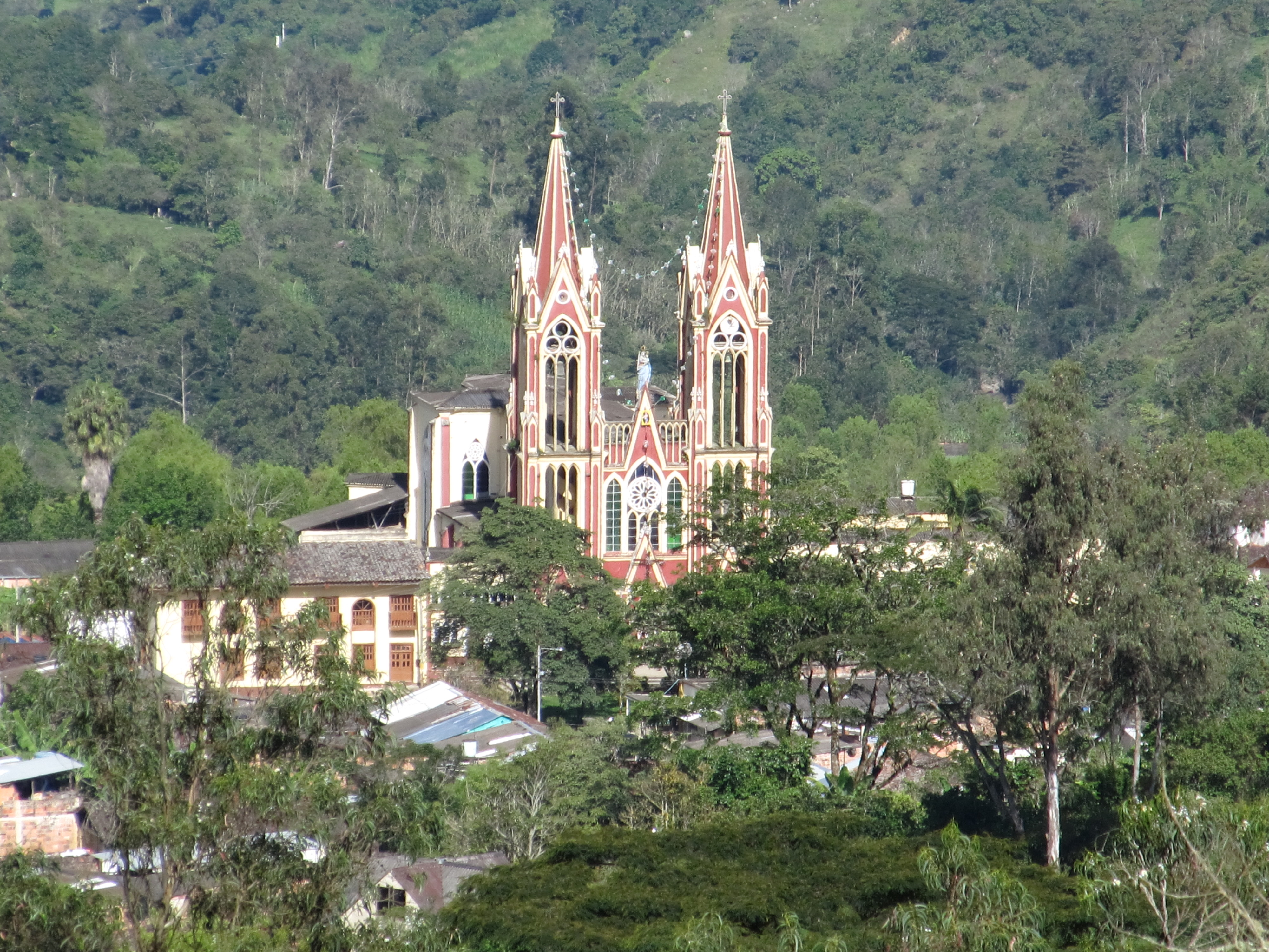 Cortesía Enrique Diaz